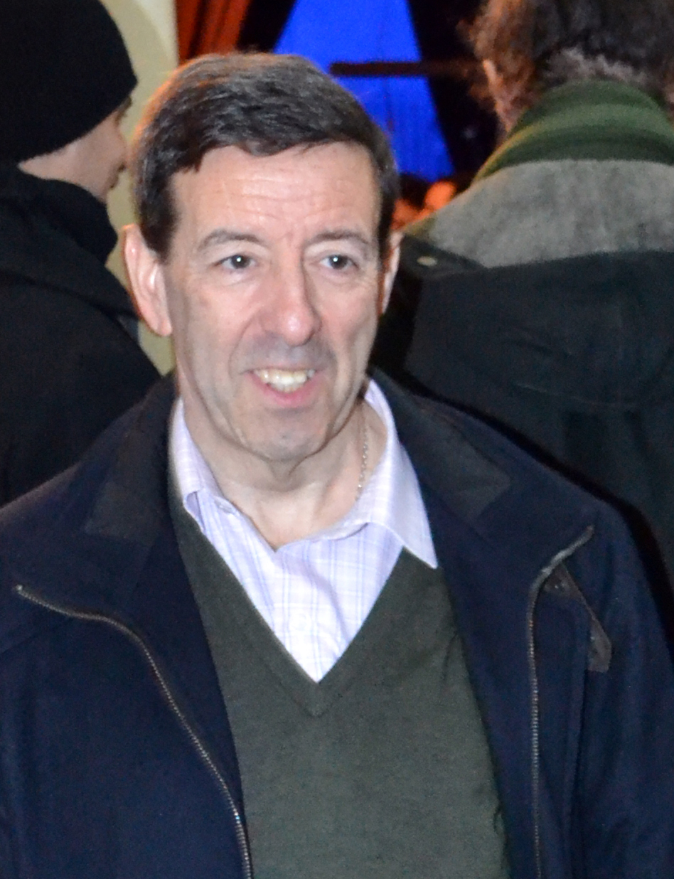 Josep Masabeu és el president del Braval, al Raval de Barcelona.